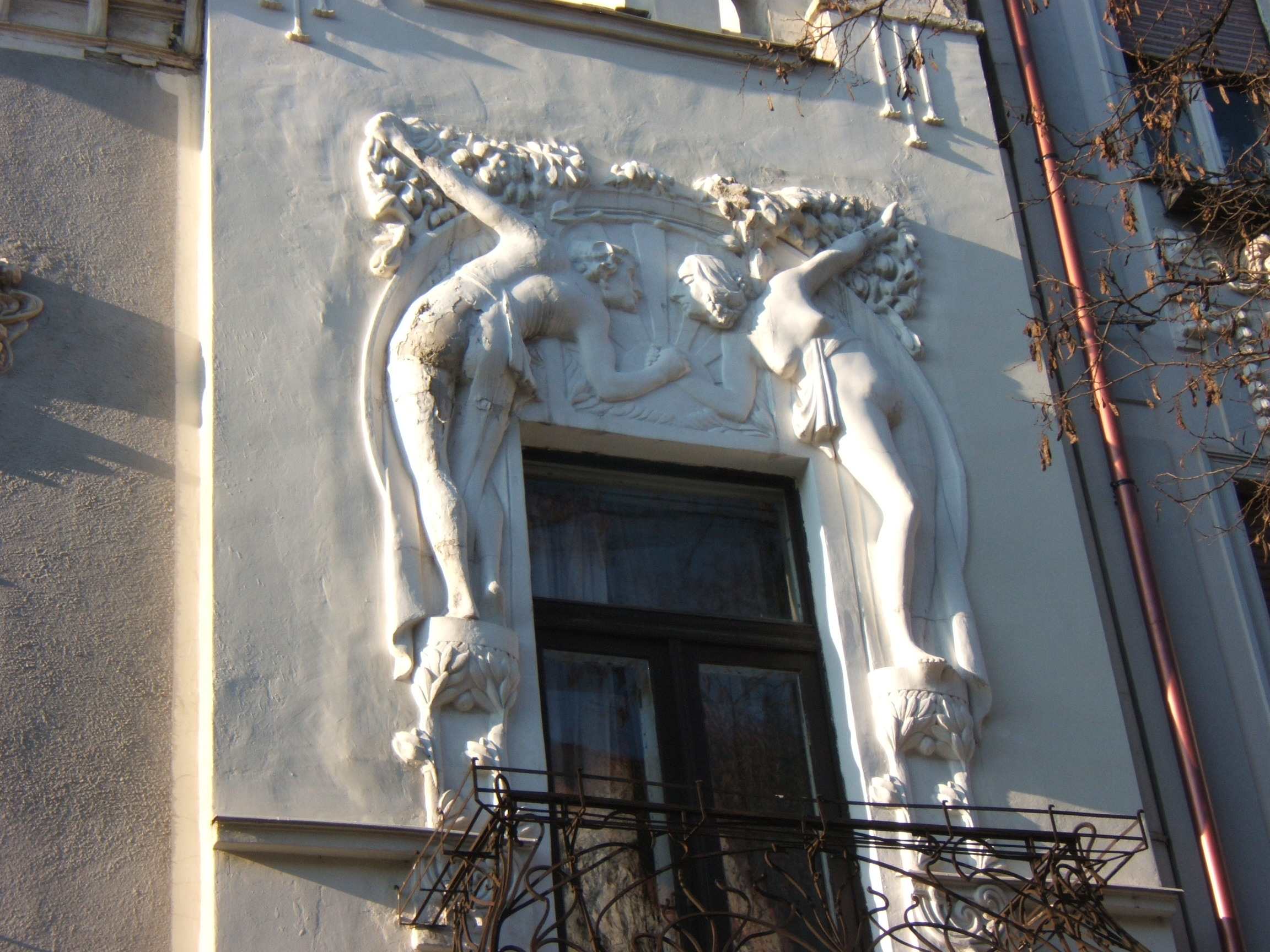 az Ádám–Éva-ház homlokzati dísze Kaposváron This is a photo of a monument in Hungary. Identifier: 7922